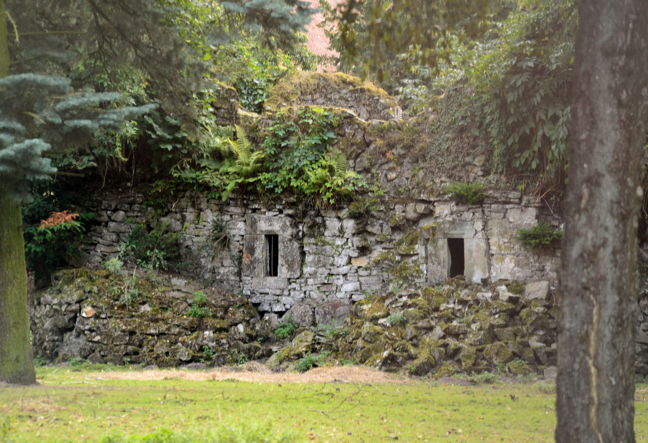 Mittelalterlicher Adelssitz Braunenbruch